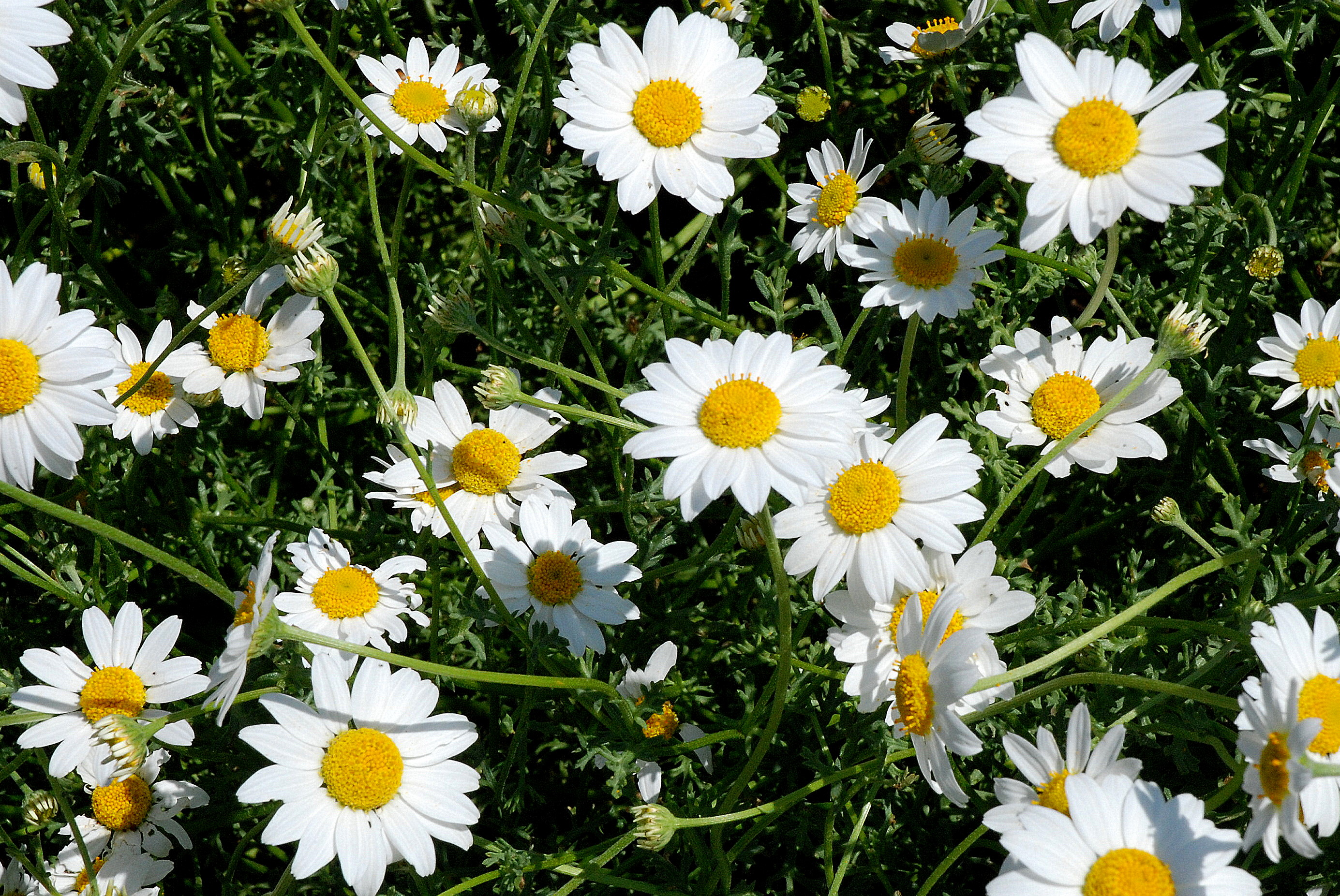 Anthemis maritima in de botanische tuin van Barcelona